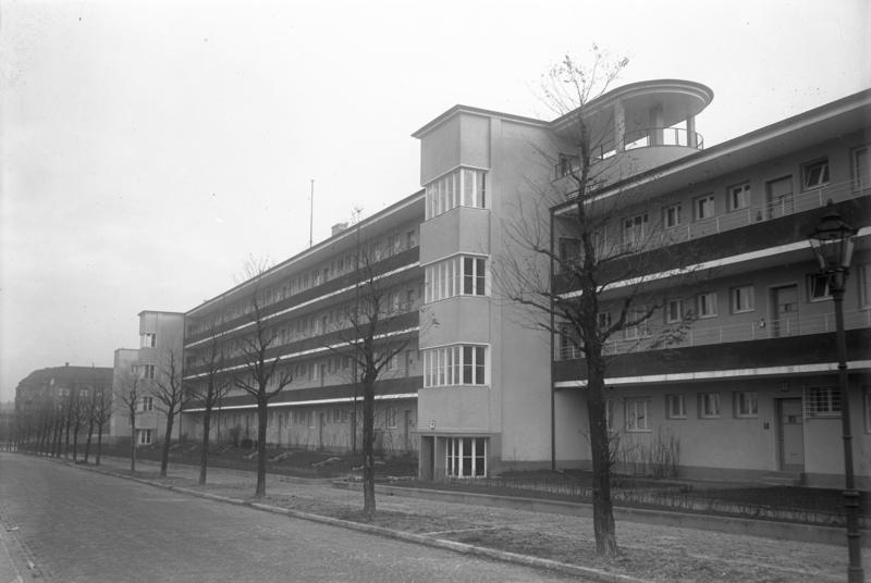 Das erste Laubenganghaus in Berlin-Steglitz! Dieses eigenartige Haus ist an der Aussenfront mit Laubengängen versehen, von welchem aus die einzelnen Wohnungen betreteten werden. Der grosse Vorzug dieser Bauart liegt darin, dass man die nicht immer einwandfrei gelüfteten Mietstreppenhäuser durch einen luftigen sonnigen Gang ersetzt hat. Ausserdem geniesst der einzelne Mieter die Behaglichkeit des Einfamilienhauses. Im Obergeschoss sind zwei grosse Luft- und Sonnenbäder für die Mieter vorhanden. Standort: Neuchateller Straße, 12203 Berlin